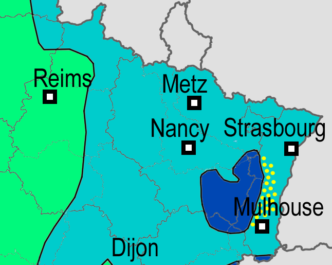 français (fr): Carte montrant le climat dans le Grand Est Français Climat montagnard Climat océanique dégradé Climat semi-continental Effet de Foehn